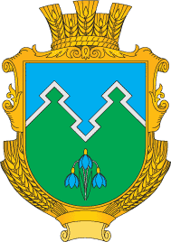 Герб Могилівської ОТГ (Дніпропетровська область)